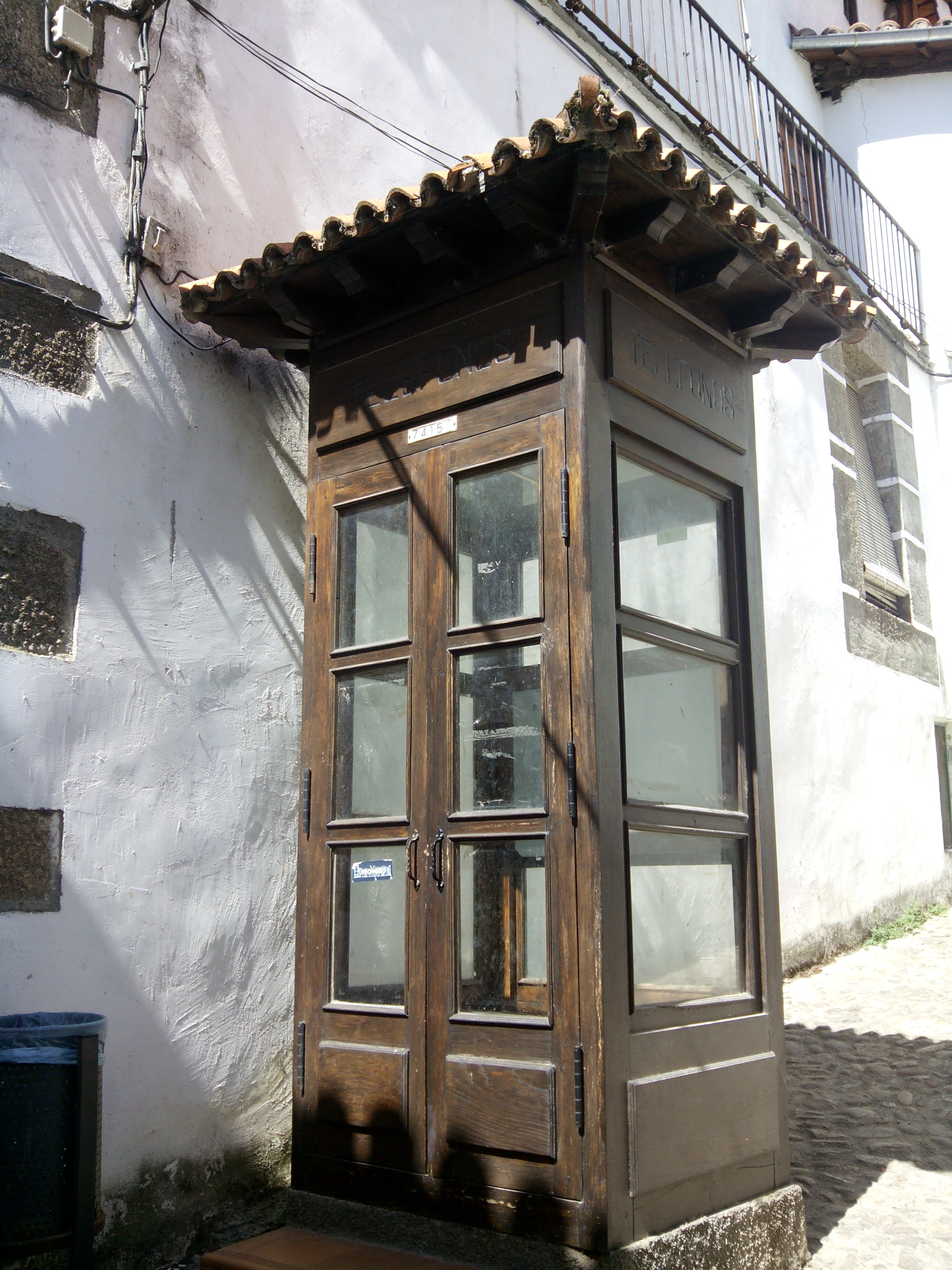 Cabina de teléfonos de madera.